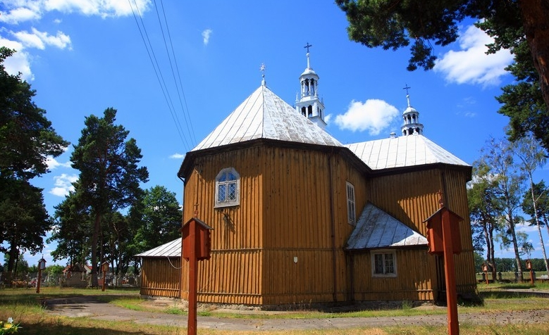 Łyse – wieś w woj. mazowieckim, w powiecie ostrołęckim, w gminie Łyse